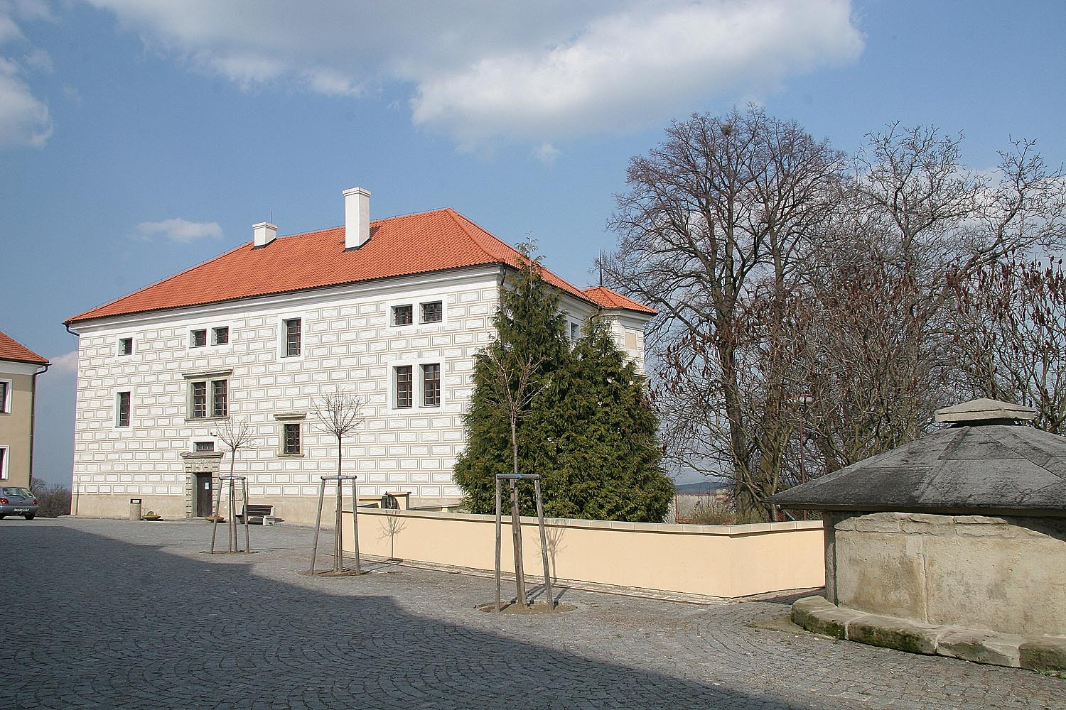 zámek v městečku Nasavrky, district Chrudim autor:Prazak datum: 1. 4. 2007